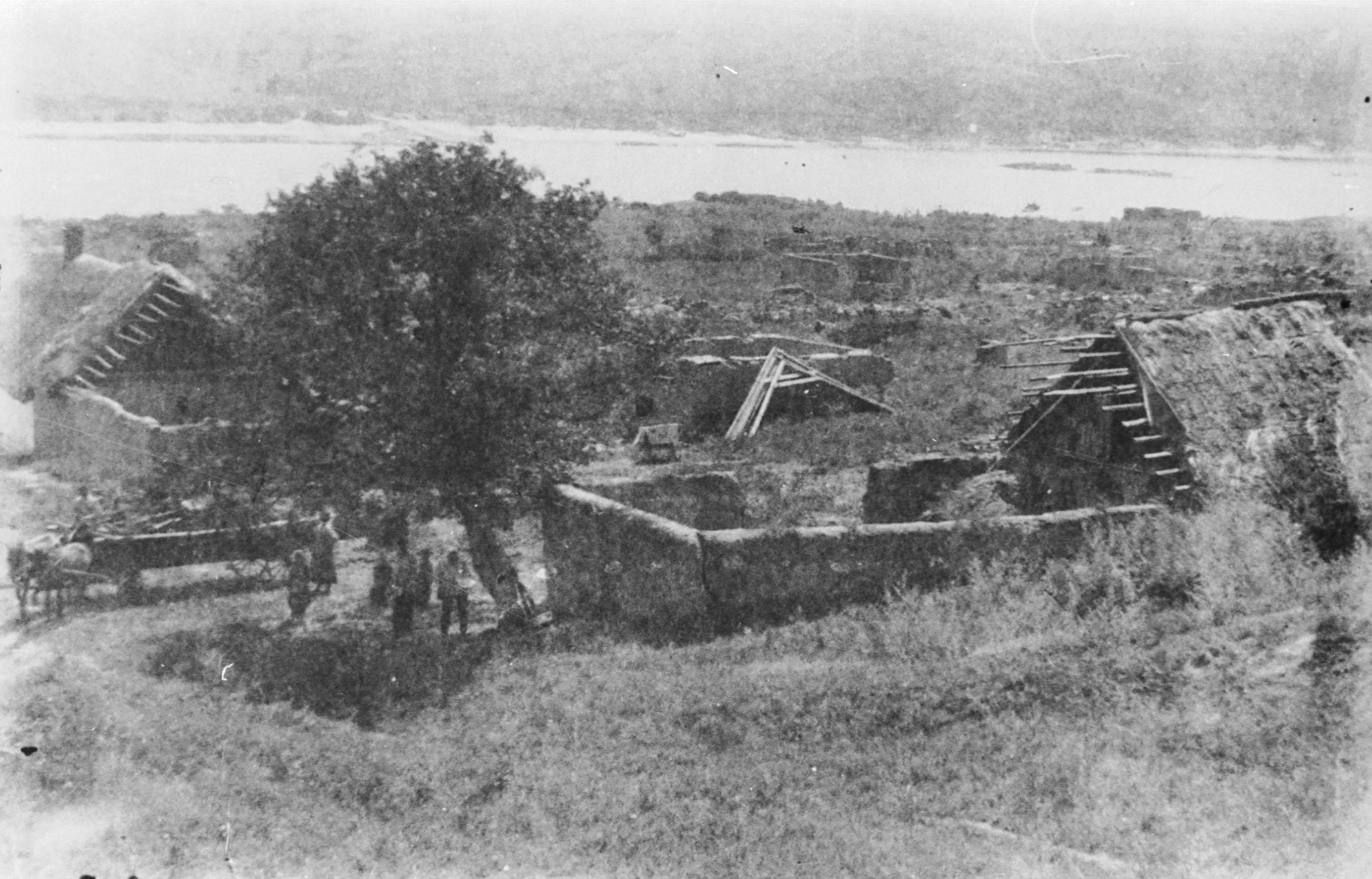 с. Вовніги